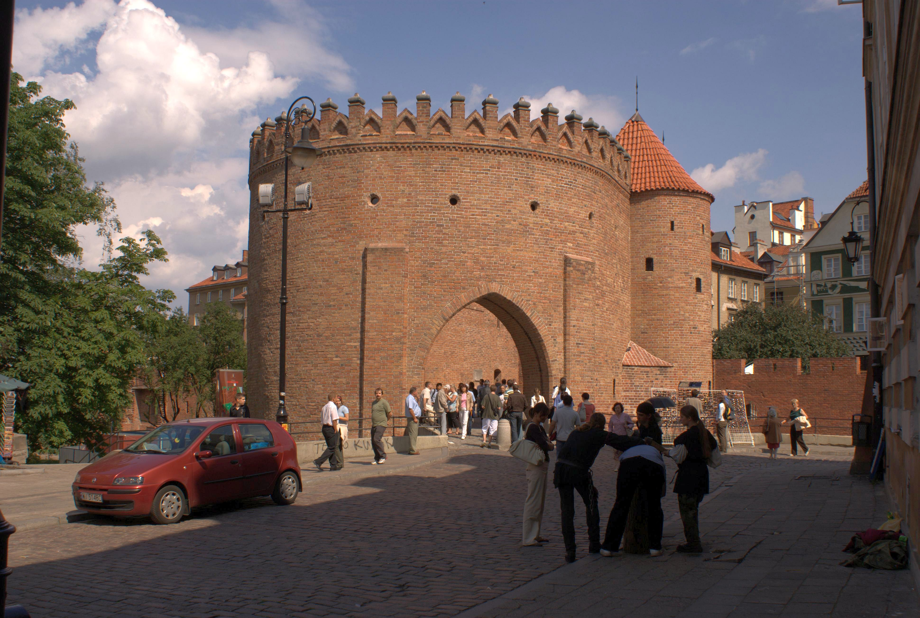 Barbican in Warsaw